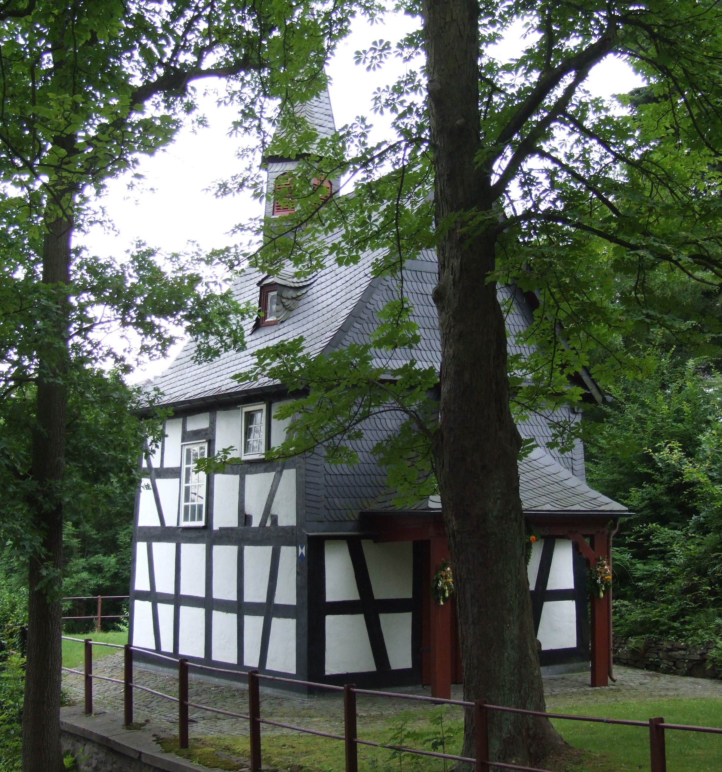 Heisterkapelle im Wissener Stadtteil Schönstein